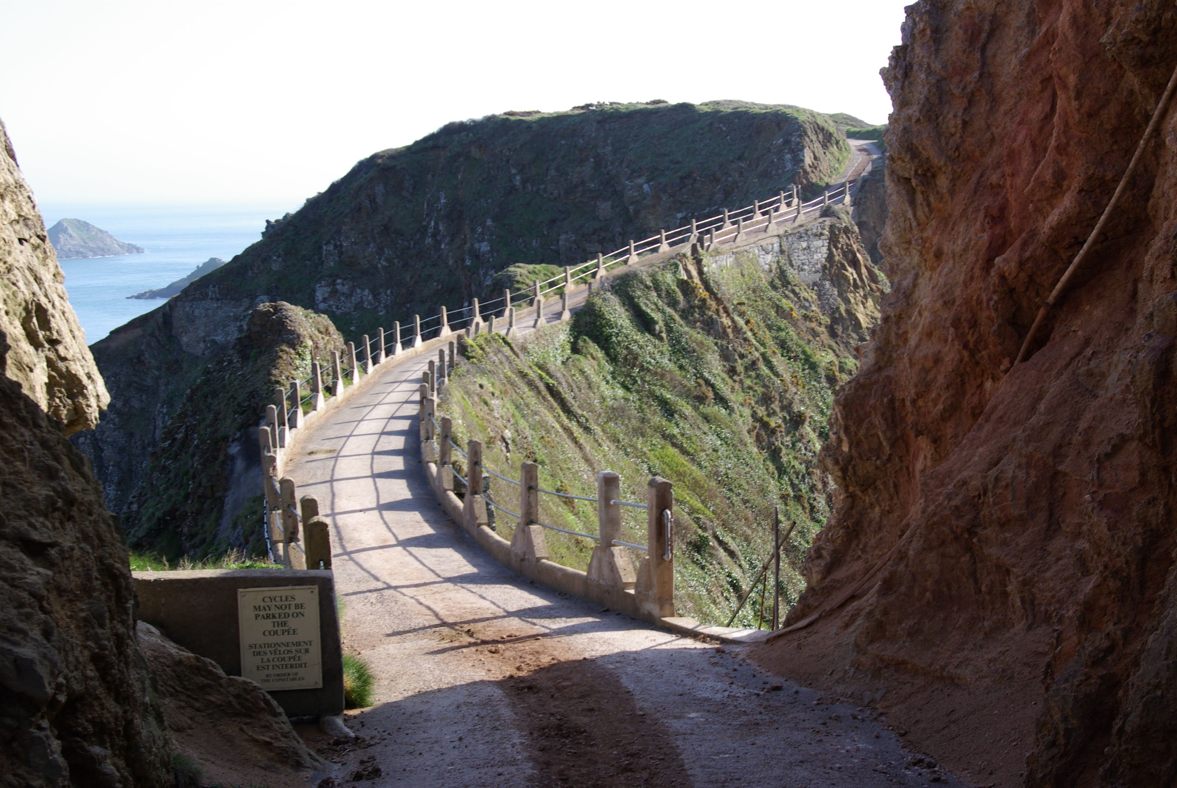 Sark, eine der Kanalinseln, die Straße Coupee, die 1945 von Kriegsgefangenen erbaut wurde (geotag in EXIF-Daten).